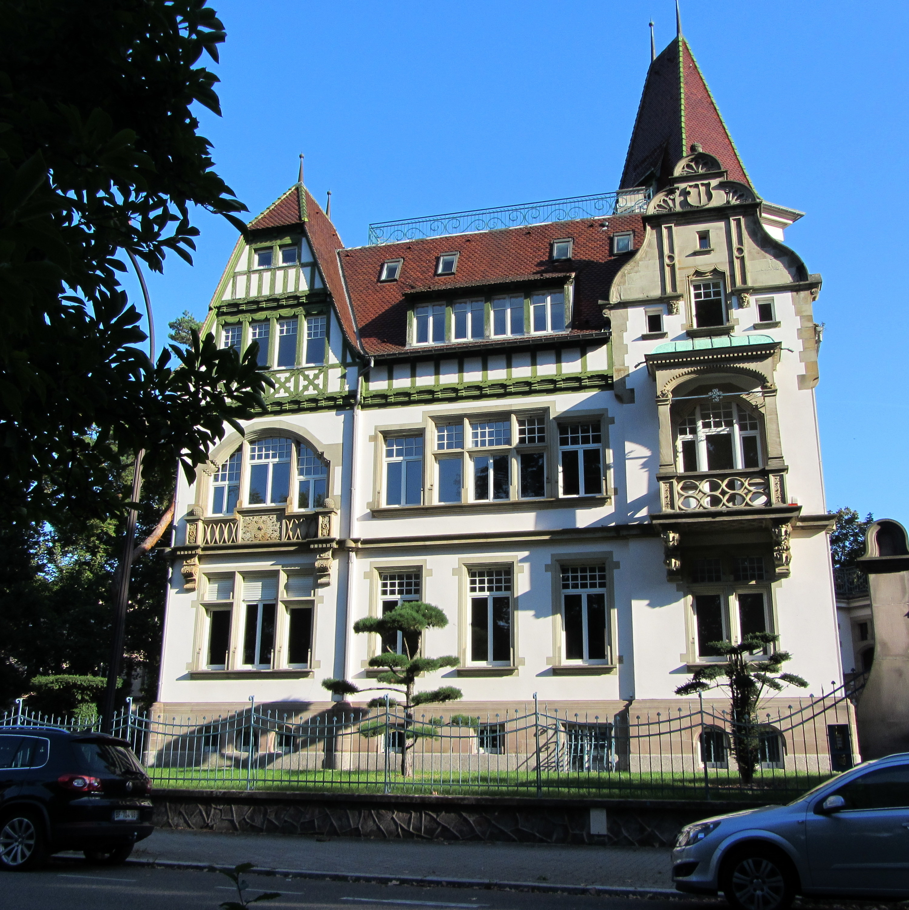 Cette somptueuse villa issue de l’Art Nouveau a été construite dans les années 1901 – 1902 par l’architecte Albert Nadler à qui l’on doit le style éclectique, mêlant des éléments empruntés à la Renaissance et au Baroque. La propriété, appartenant à un certain Gunderloch, tailleur de pierres, avait été cédée avant la fin des années vingt à un autre architecte Waldemar Osterloff. C’est sous le nom de cette famille, originaire de Saint-Petersbourg que la villa a été dénommée jusqu’à nos jours, et qui devient, après rénovation Le manoir du Contades. .